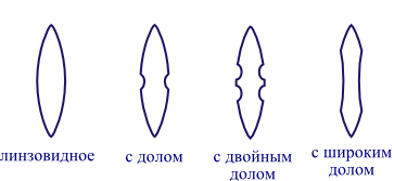 Поперечные сечения клинков некоторых видов мечей